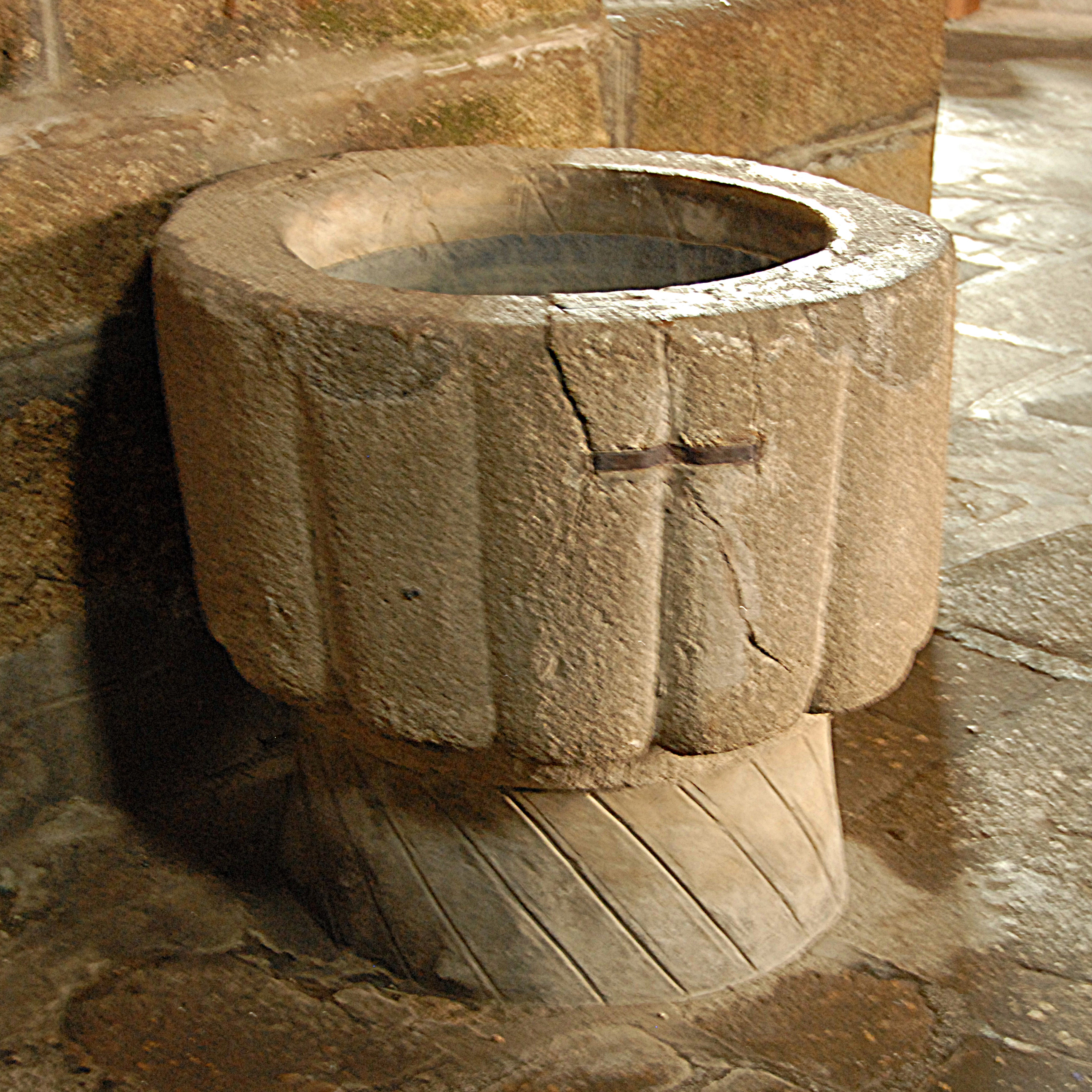 St-Junien, Weihwasserbecken 12. Jh.